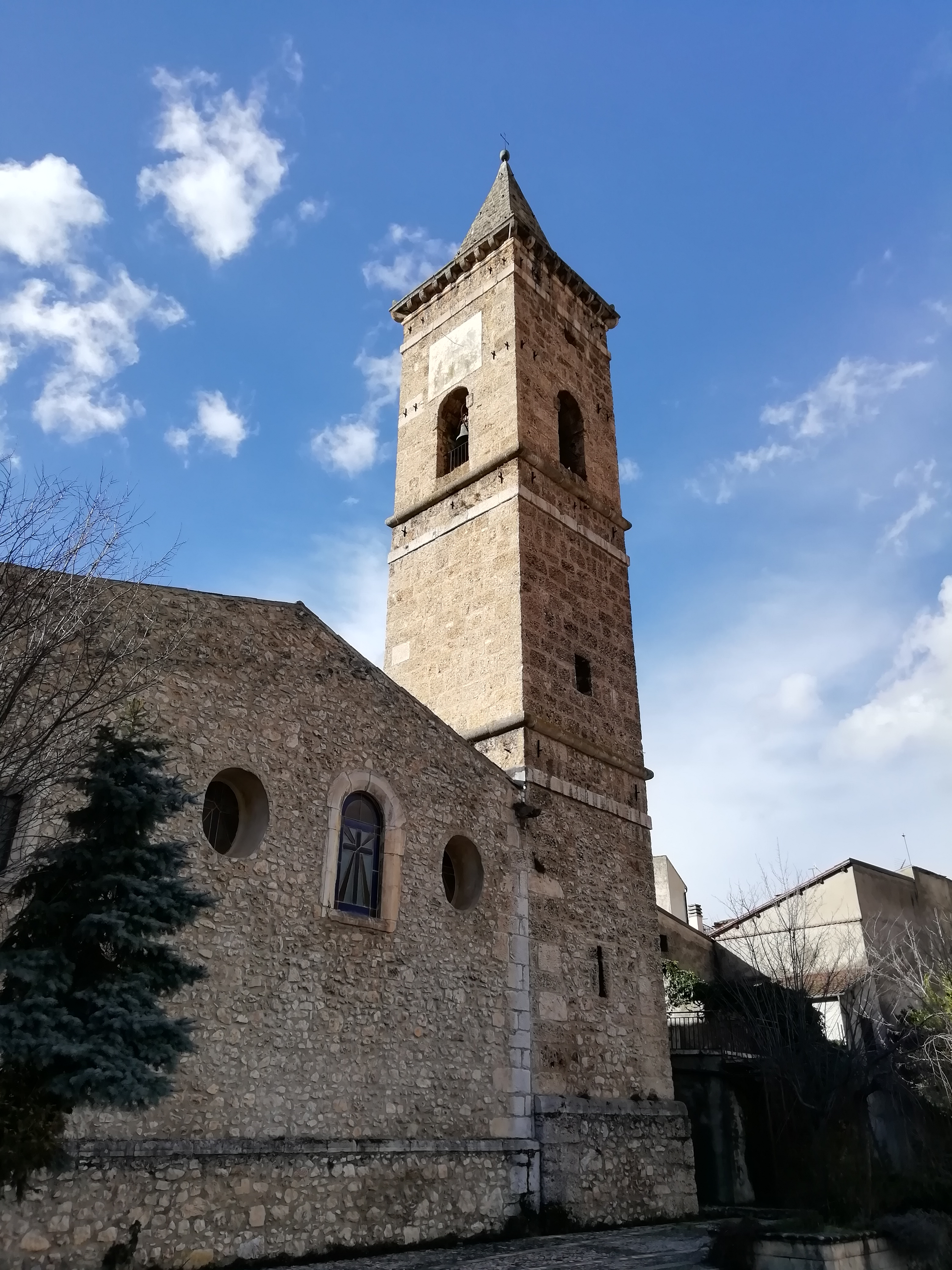 Questo campanile fu edificato nel 1600, in aggiunta alla già eretta chiesa.